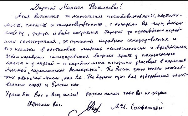 Автограф А.И.Солженицына о Михаиле Матвееве